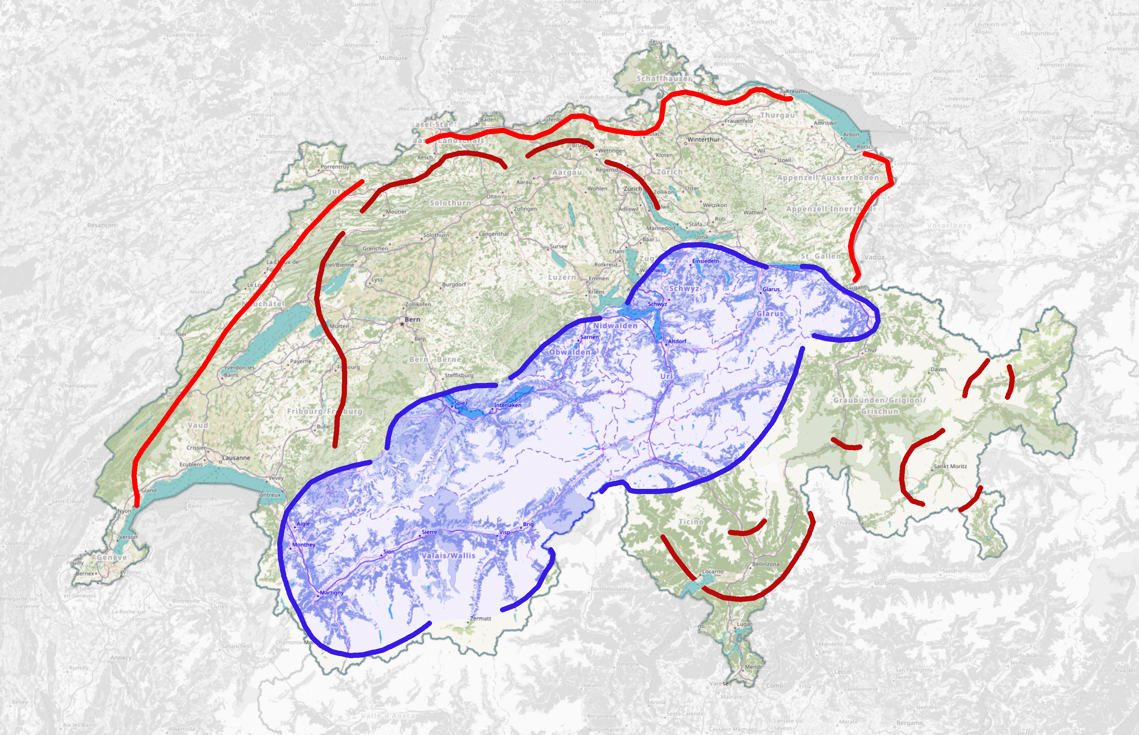 Reduitlinien in der Schweiz. Die blaue Linie / Zone zeigt das eigentliche Rückzugsgebiet. (Basis ist eine Karte von OpenStreetMap).